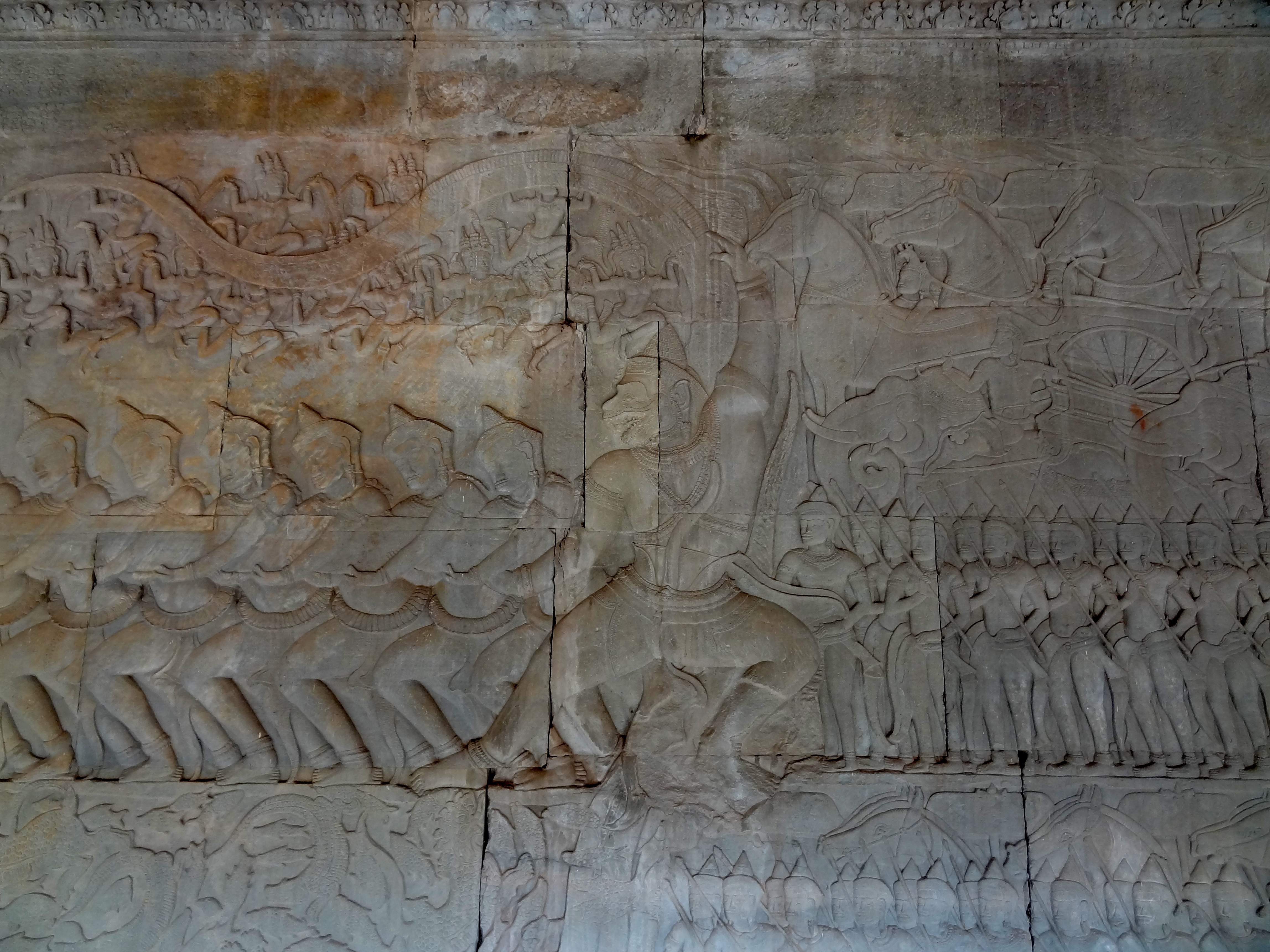 Hanuman und Götter beim Quirlen des Milchmeeres, Südflügel der Ostseite der dritten Galerie des Tempels von Angkor Wat (អង្គរវត្ត ‚Tempelstadt‘), Provinz Siem Reap, Kambodscha